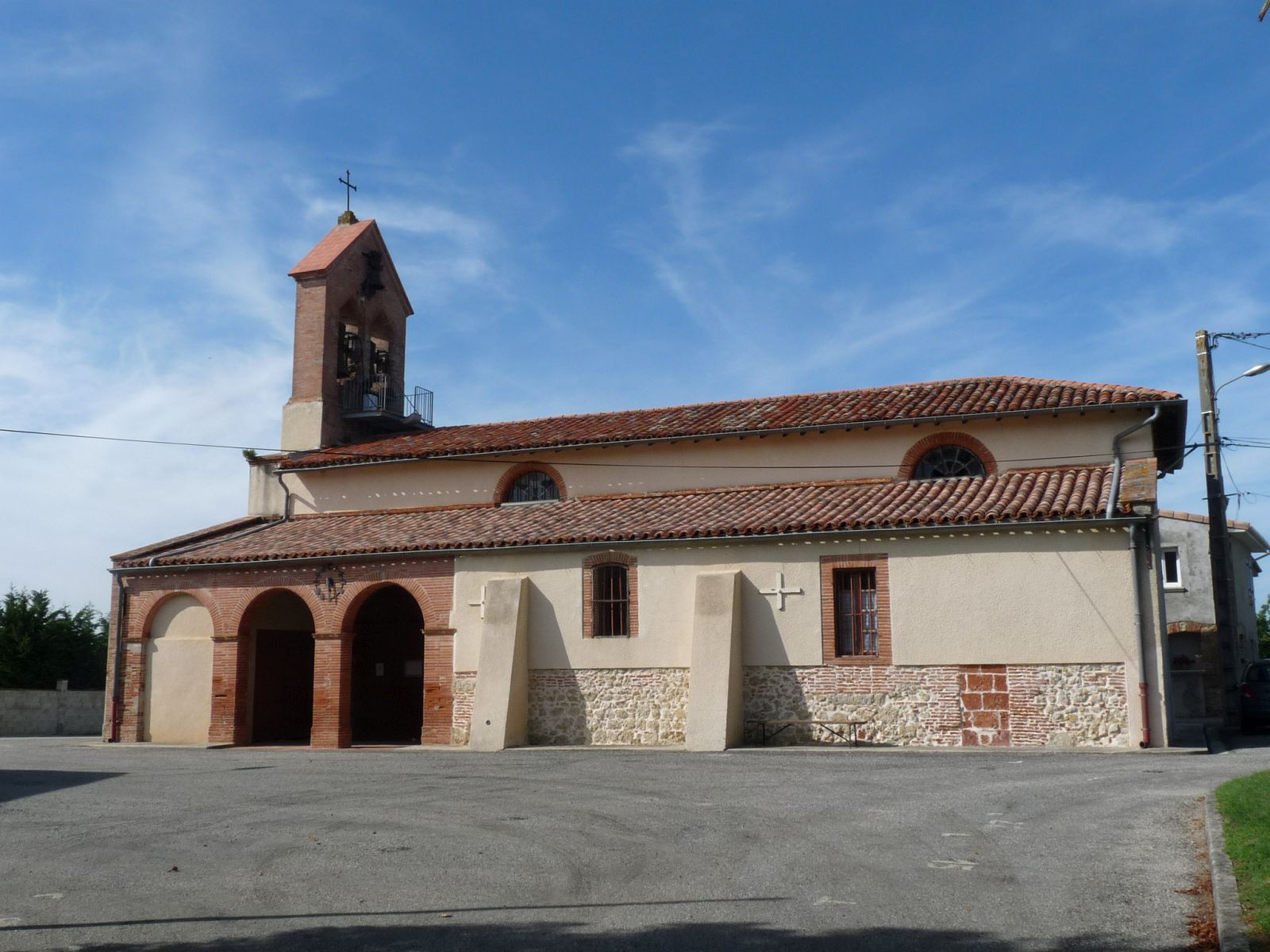 Eglise de Seyre, Haute-Garonne, France